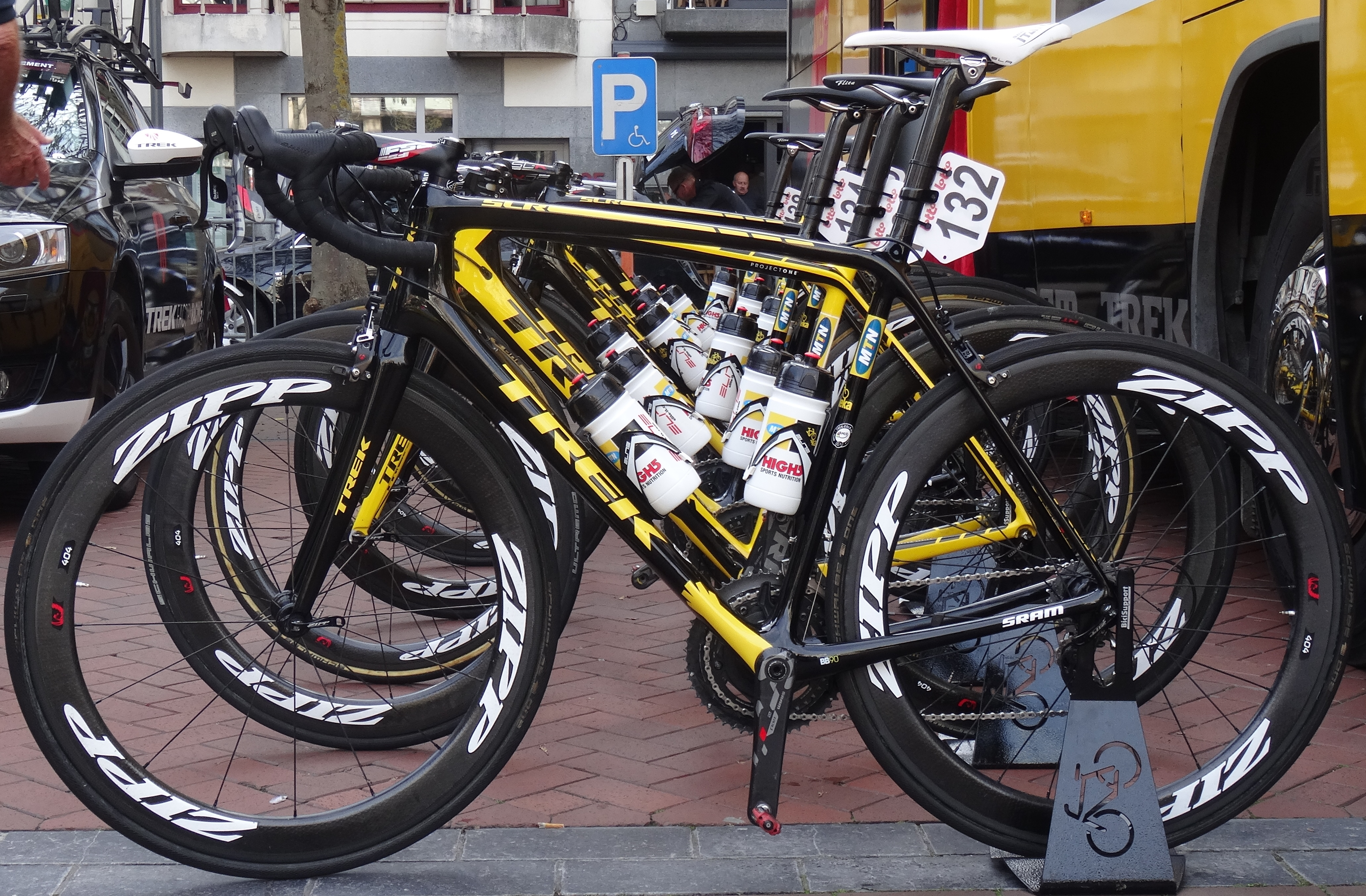 Reportage photographique réalisé le samedi 4 octobre à l'occasion du départ de la troisième étape de l'Eurométropole Tour 2014 à Blankenberge, Belgique.